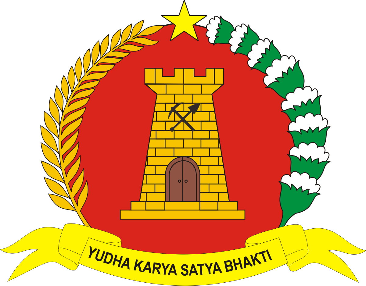 logo zeni ad